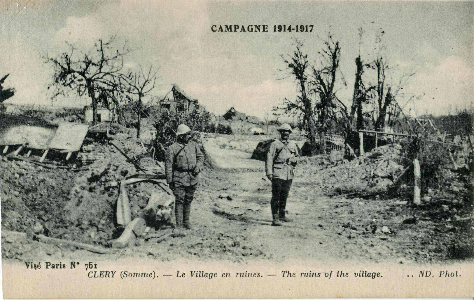 Carte postale ancienne éditée par ND, collection Campagne 1914-1917:CLERY (Somme) - Le village en ruines